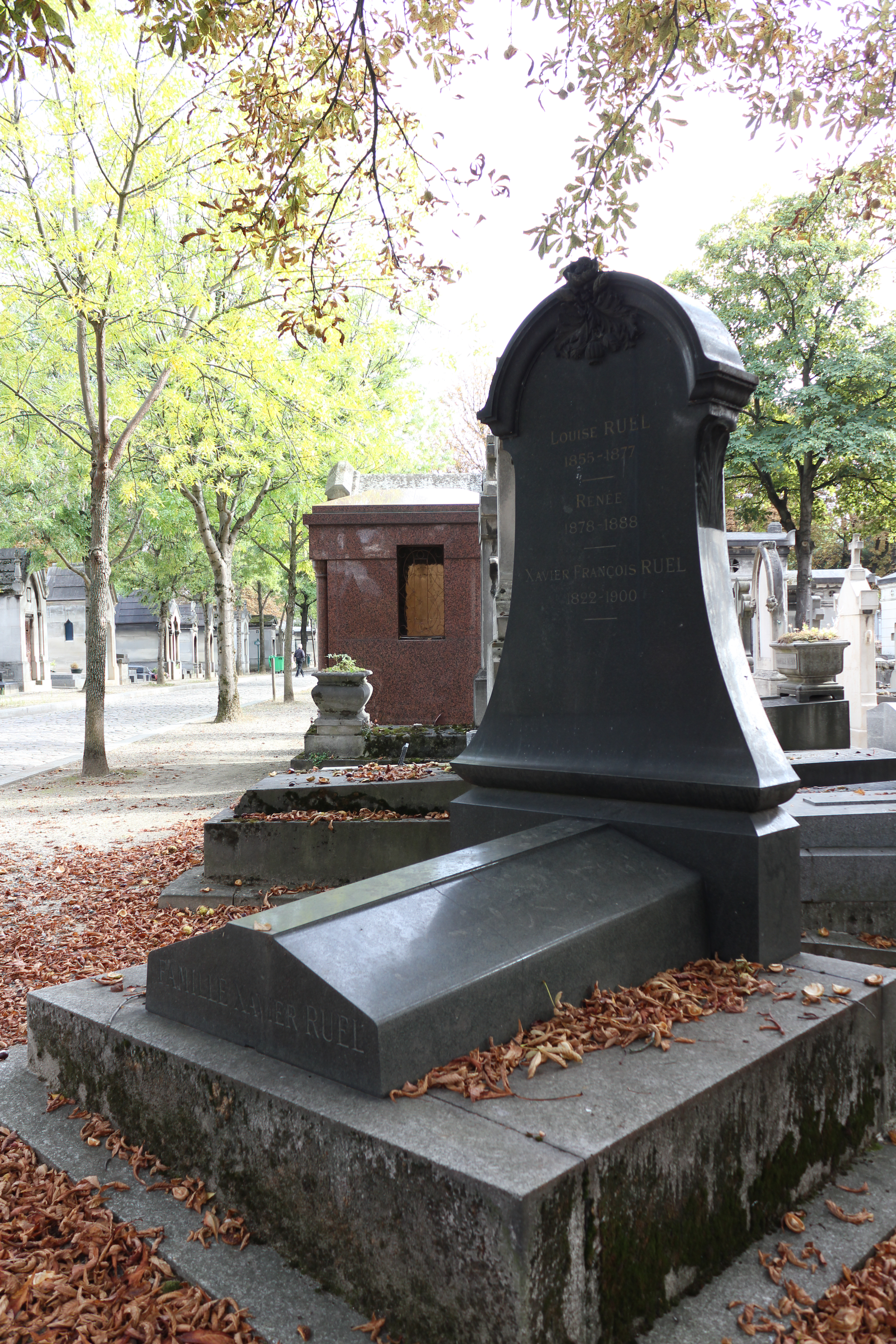 Tombe ornée à l'origine d'une statue grandeur nature d'une jeune fille et un enfant par Deschamps et sur le piédestal un bas-relief par Bruchon.